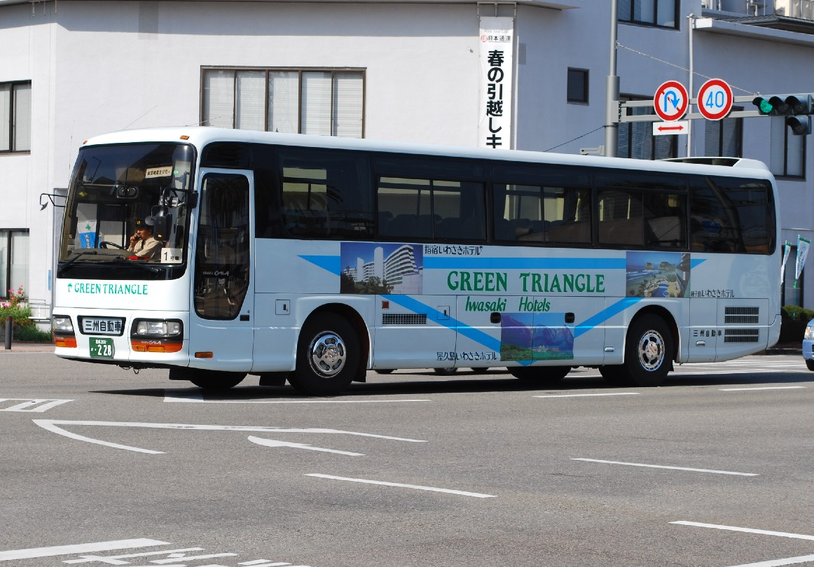 三州自動車の車両。宮崎駅前の公道上にて撮影。